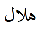 Хиляль